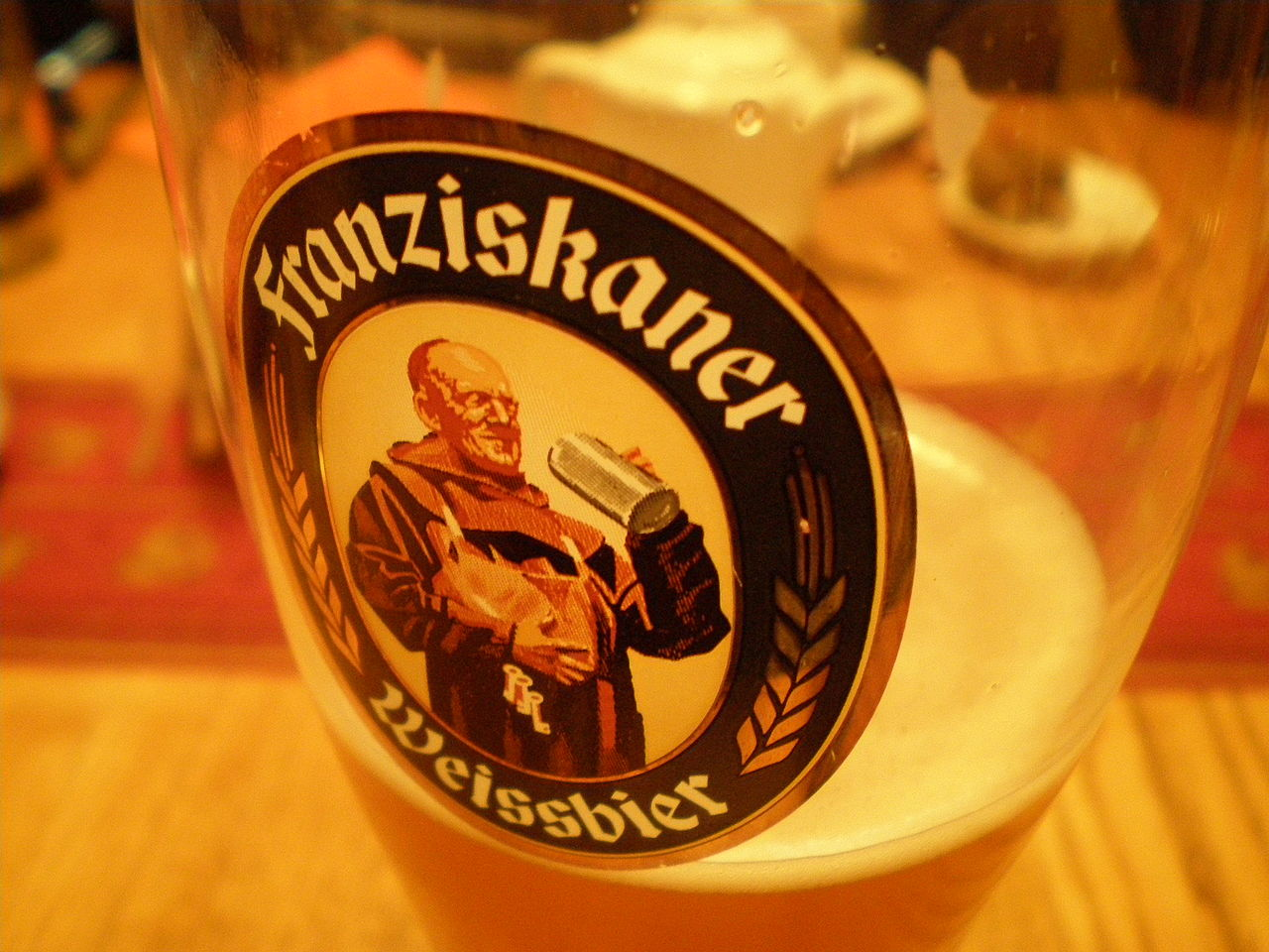 Bugday birasi